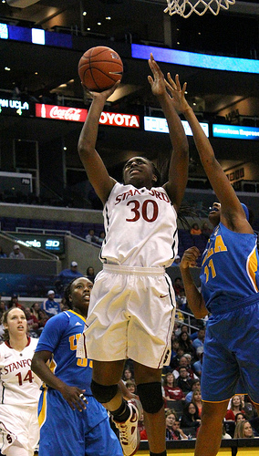 La basketteuse américaine de Stanford Nmekadi Ogwumike